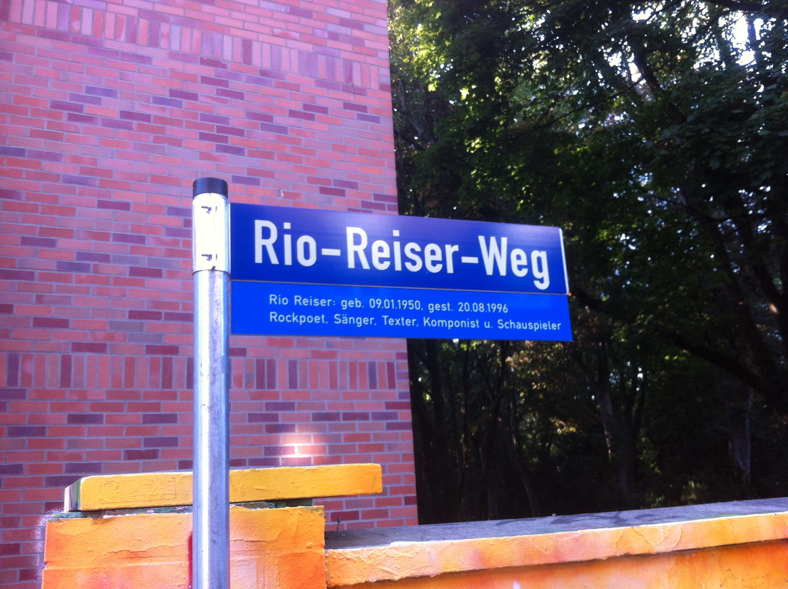 Rio-Reiser-Weg in Unna (NRW) am Kulturzentrum Lindenbrauerei. Einweihung am 17.08.2012, die Aufnahme stammt vom 16.09.2012